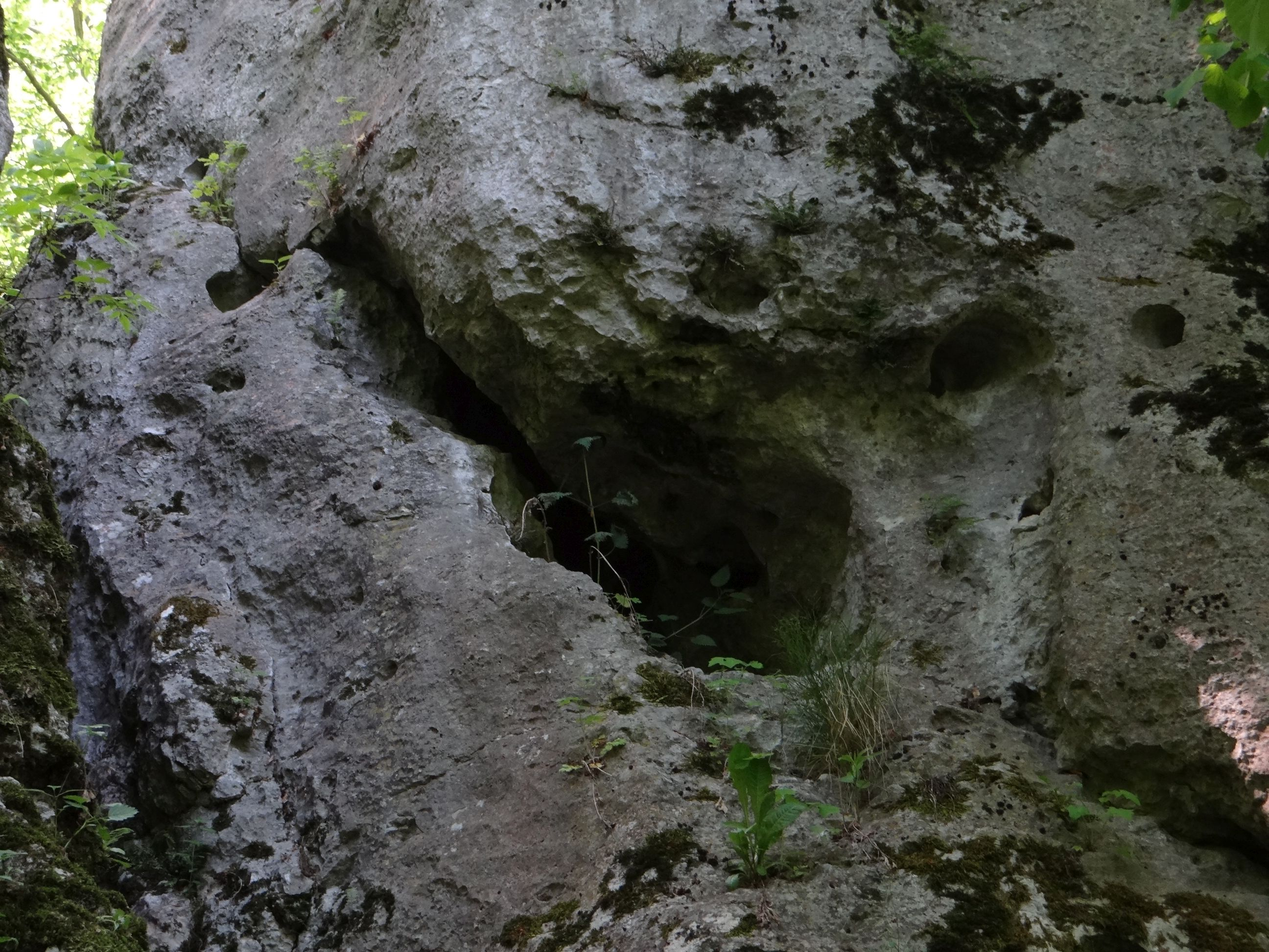 Rura w Skale Oczko